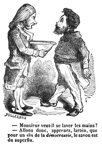 "Monsieur veut-il se laver les mains ? - Allons donc, apprenez larbin, que pour un élu de la démocrassie, le savon est du superflu."